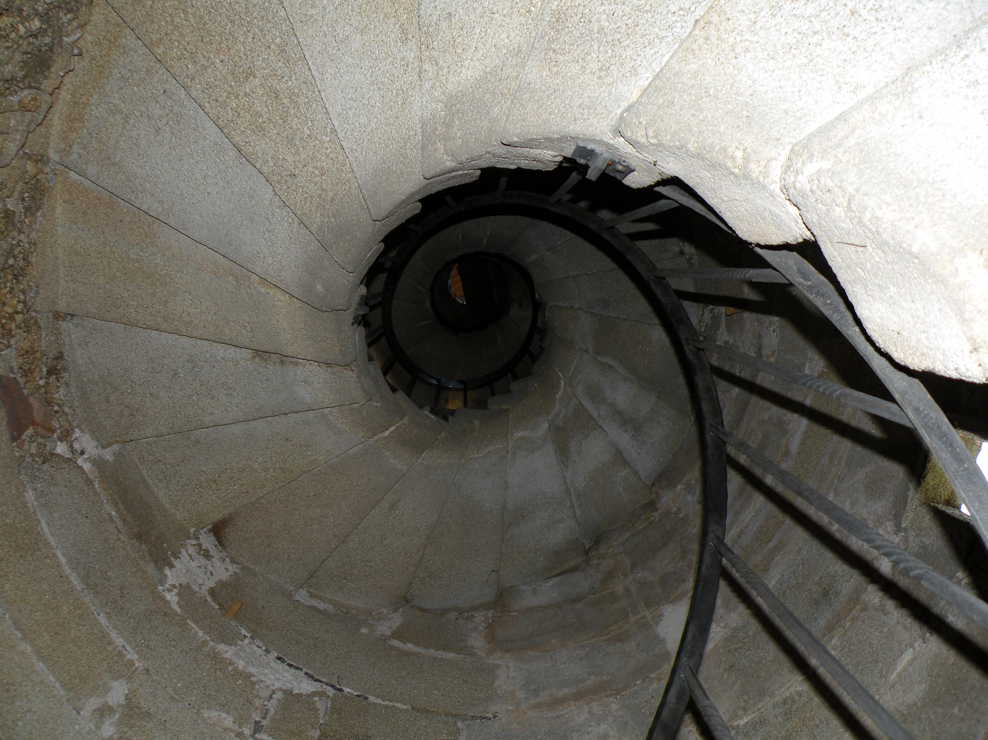 Schneckentreppe im Westturm der Wallfahrtskirche Allerheiligen im Mühlkreis im Bezirk Perg in Oberösterreich